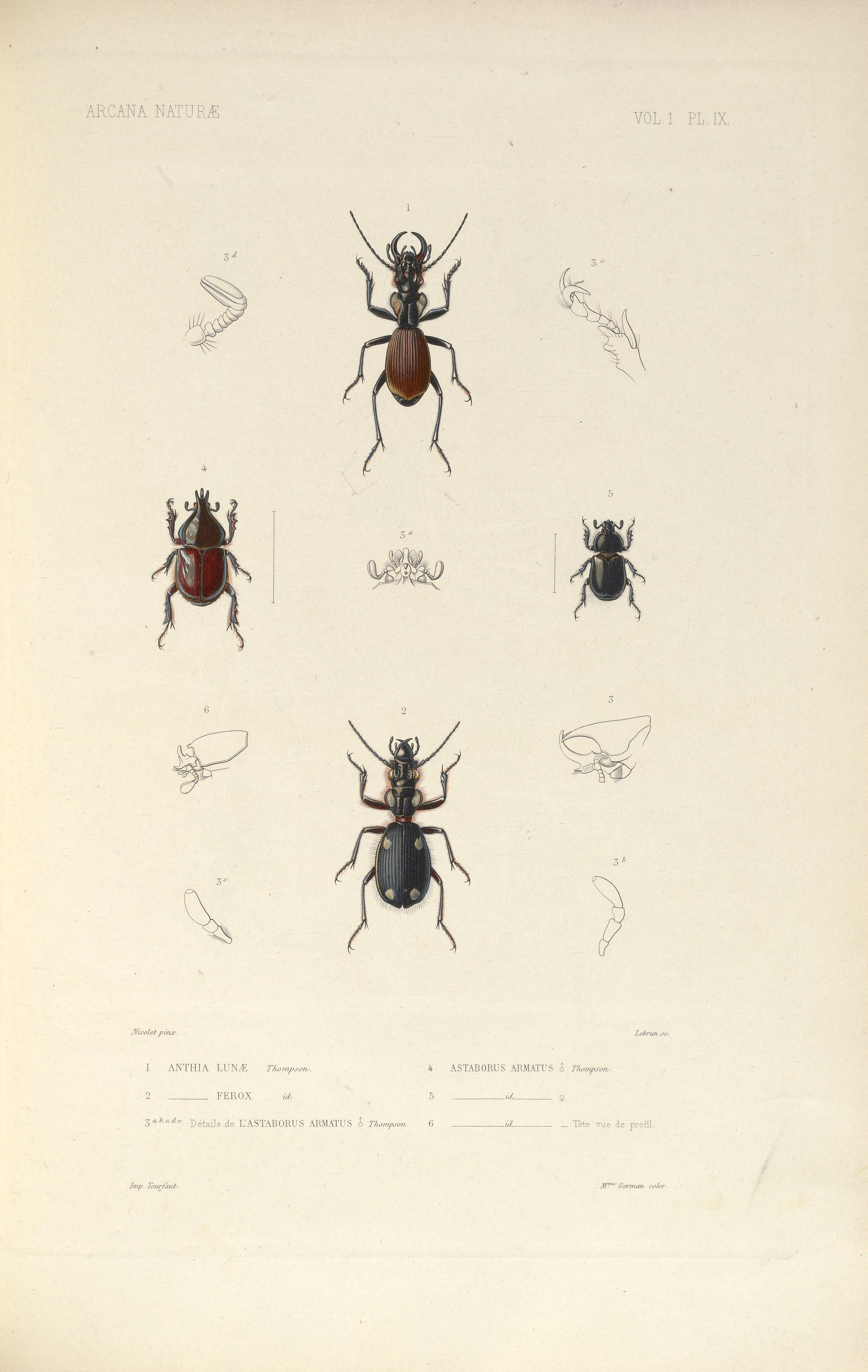 Arcana naturæ, ou Recueil d'histoire naturelle